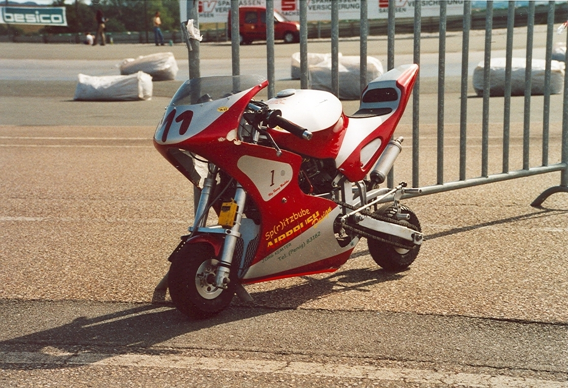 Minibike - wie in der DDR alles begann. Auf dem Sachsenring fuhr 2003 auch die Klasse "Die Originalen". In der DDR mit dem Simson-Motor des Rollers SR 50/80. 2009-2010 Der Minibike Sport lebt noch immer. Zur Zeit, sind noch etwa 12 aktive Fahrer in Sachsen, rund um den Sachsenring unterwegs. "Die Originalen" leben weiter duch alte und neue Fahrer die sich diesem Sport verschrieben haben. 2010 geht es am 17-18 April in Hagenwerder wieder los. 5 weitere Stationen folgen noch und werden wieder spannende Zweikämpfe und begehrte Punke hervorbringen. Für alle die mehr wissen wollen oder sogar selbst einmal bei einem Probetraining die Power der kleinen Maschinen spüren wollen, sucht Kontakt zu uns unter .